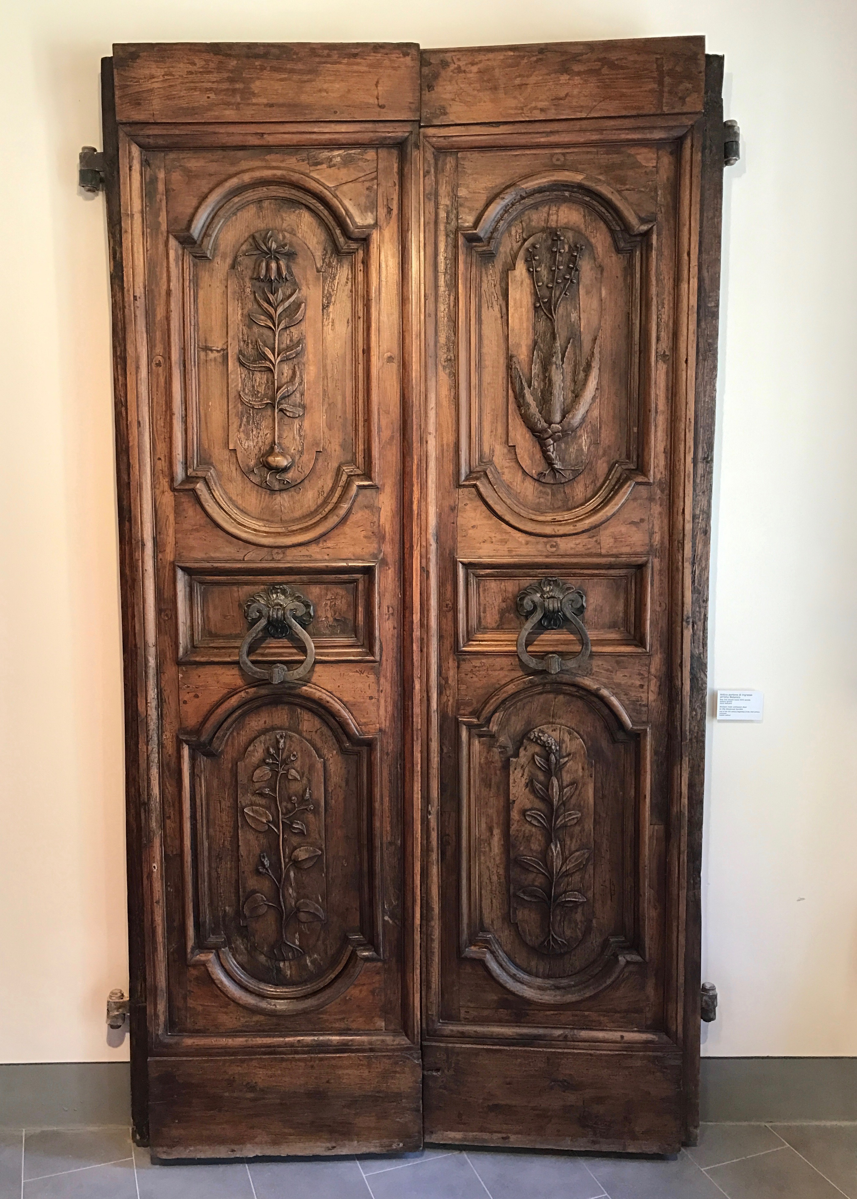 Portone in noce dell'orto botanico di Pisa in via Santa Maria. Esposto nel Museo Botanico dell'università di Pisa